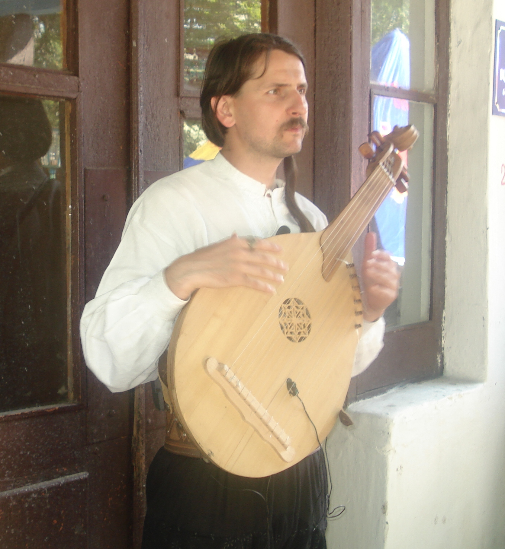 фото